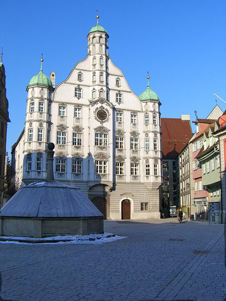 Memminger Rathaus